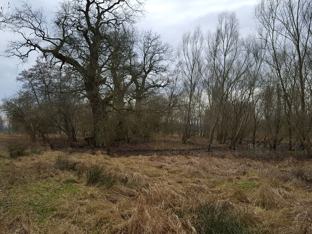 Slawischer Burgwall Reckahn.jpg